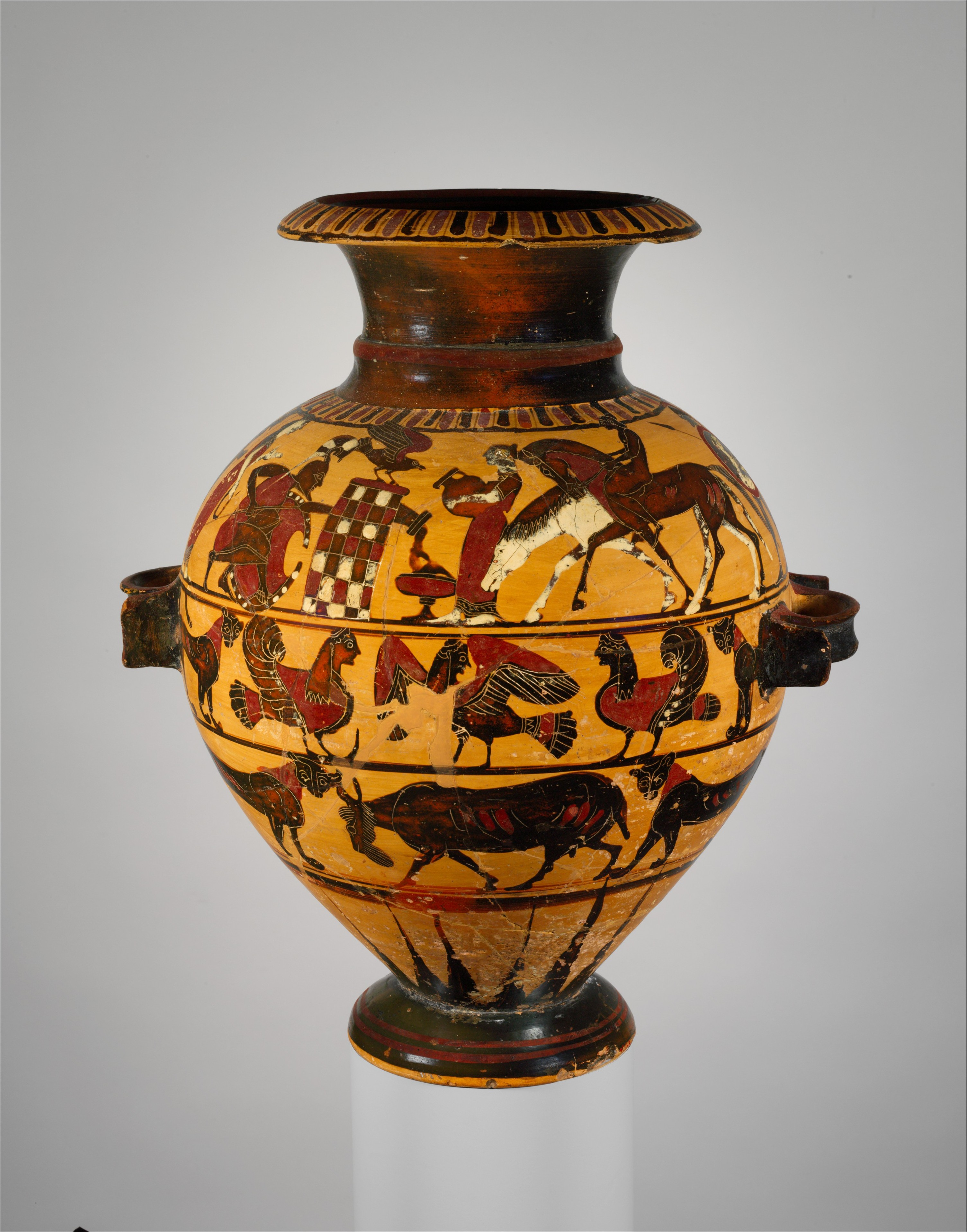 Greek, Attic; Hydria; Vases